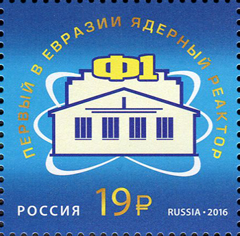 Почтовая марка России, выпущенная 8 декабря 2016 года и посвящённая Ф-1, первому в Евразии ядерному реактору. Номер по каталогу ЦФА — 2179. Художник — А. Дробышев. Тираж — 225000.